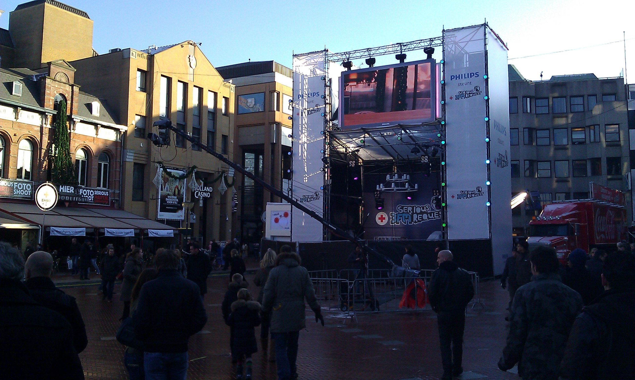 De markt en het Glazen Huis in afwachting van de opening... #sr10